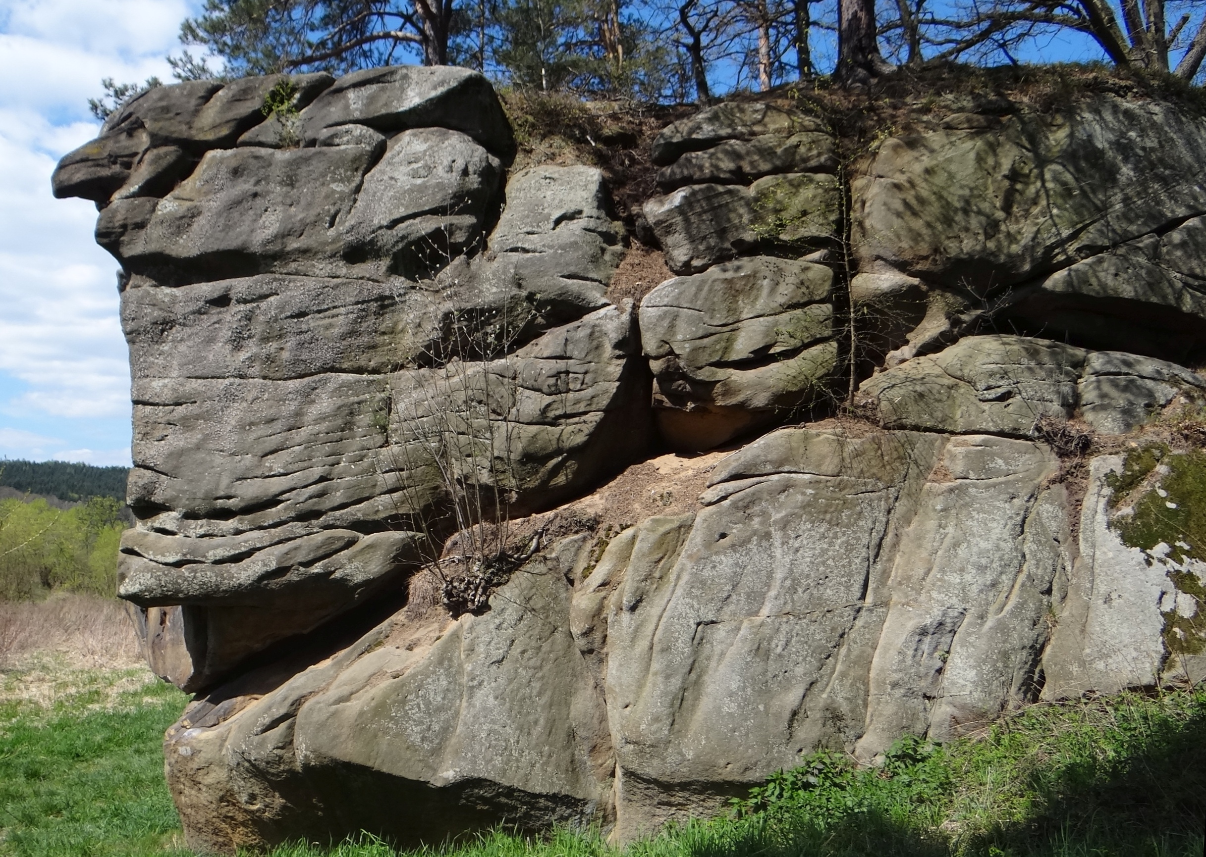 Czarownica - skała w rezerwacie przyrody Skamieniałe Miasto